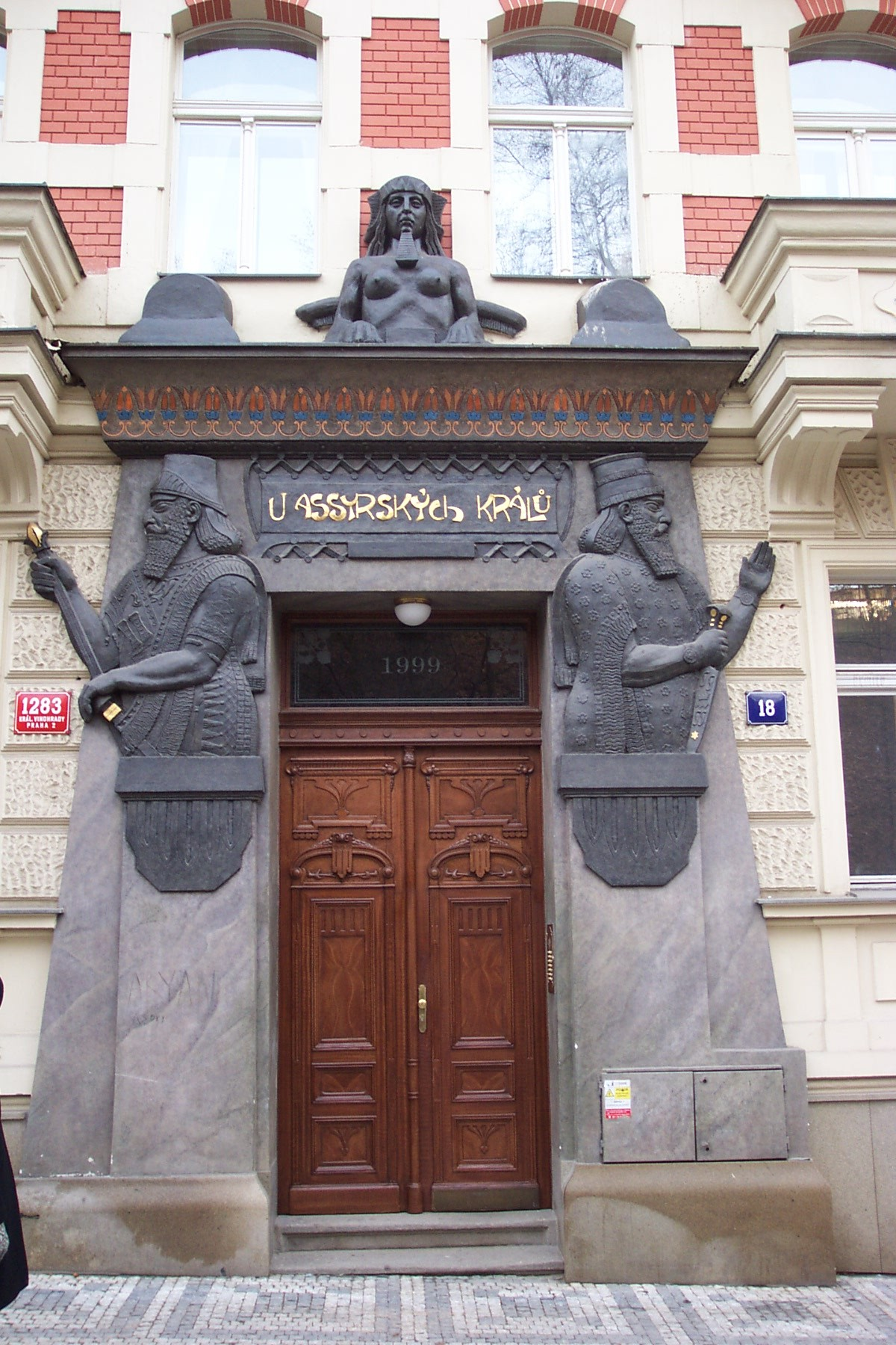 Praha-Vinohrady, Polská 1283/18, U assyrských králů, Façade art nouveau.